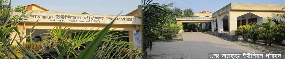 Damkura Union Parishad.jpg